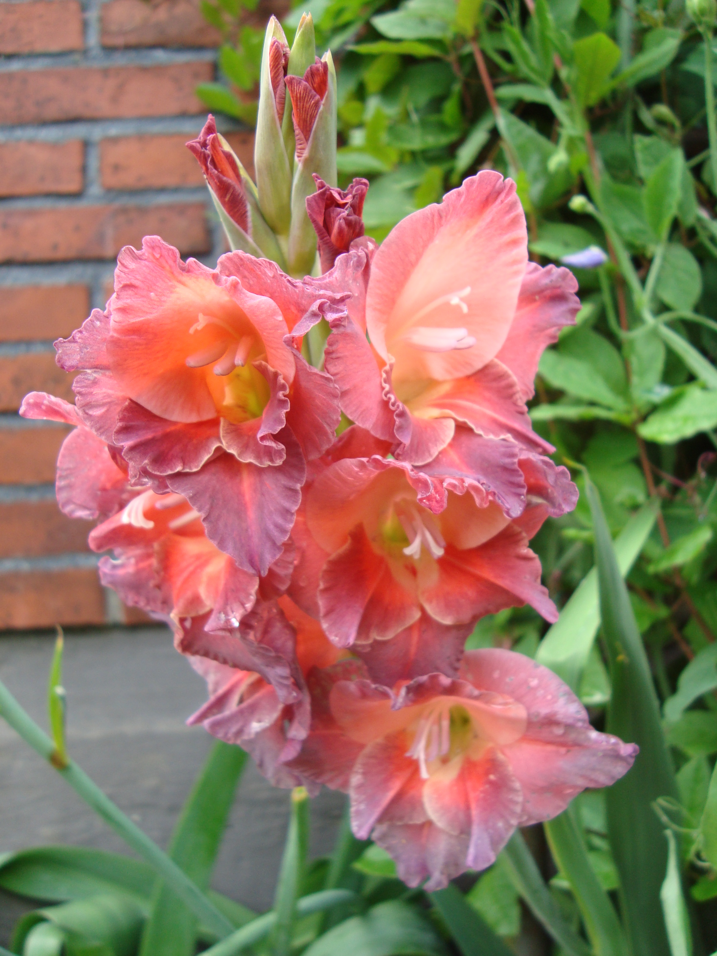 Gladiolus × hortulanus 'Tantastic' (Cartmell 1991)